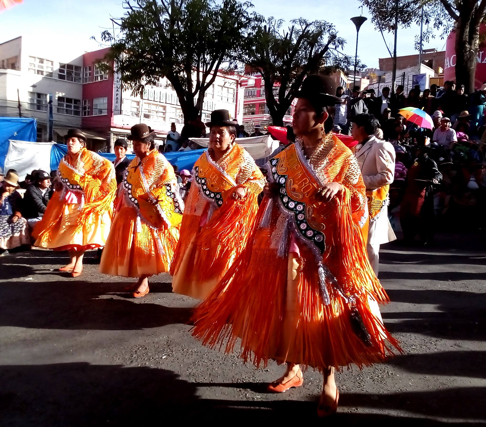 La Paz Bolivia 2017